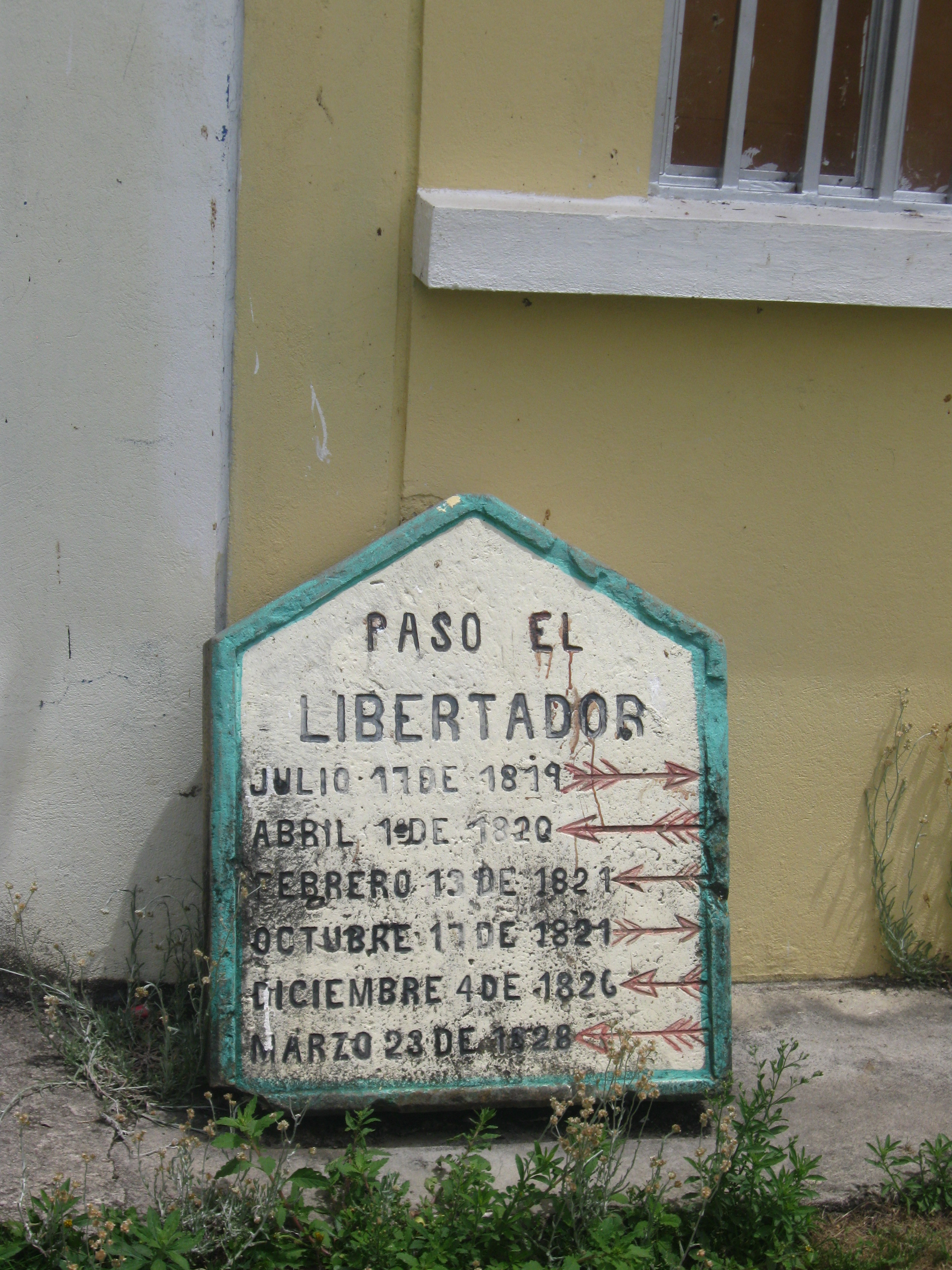 Placa que recuerda el paso de Bolivar por Sativanorte